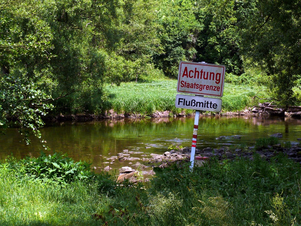 Nationalpark Thayatal: Staatsgrenze